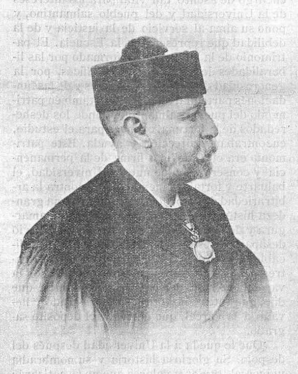 Pensador tradicionalista